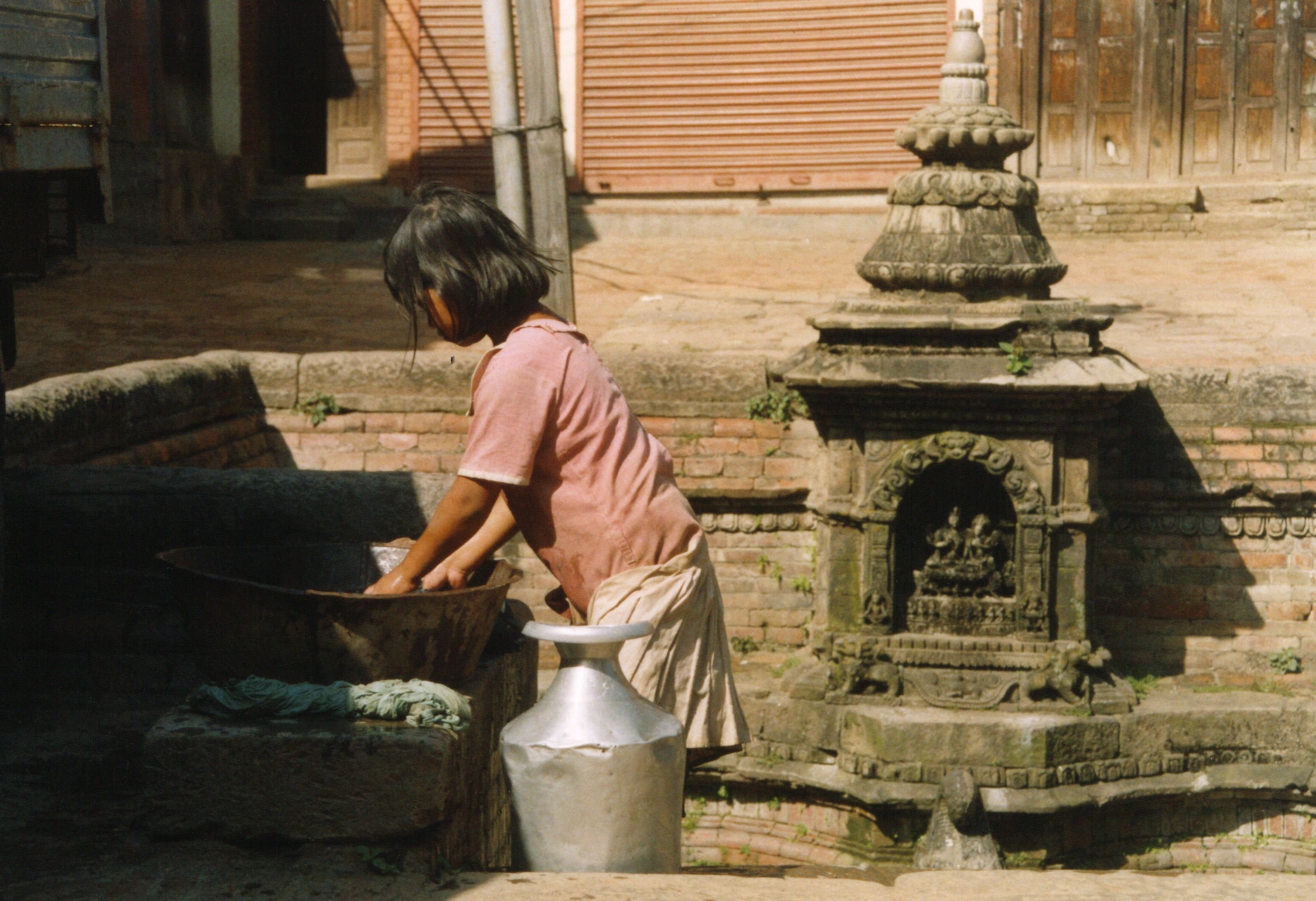 spring in Bhaktapur